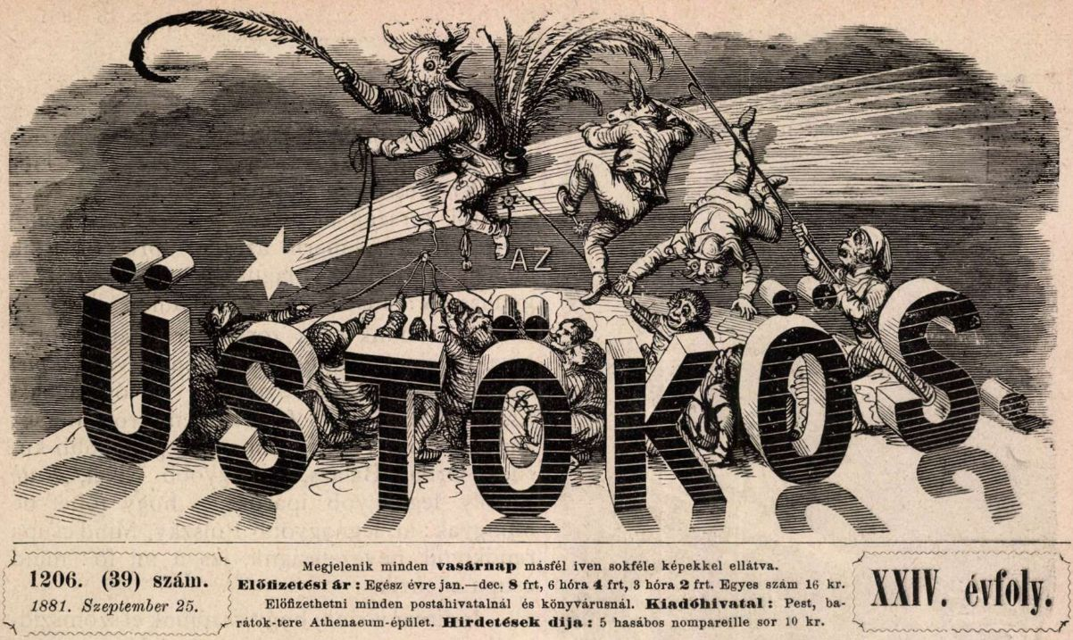 Az Üstökös élclap fejléce (1881-es évfolyam, 39. szám)